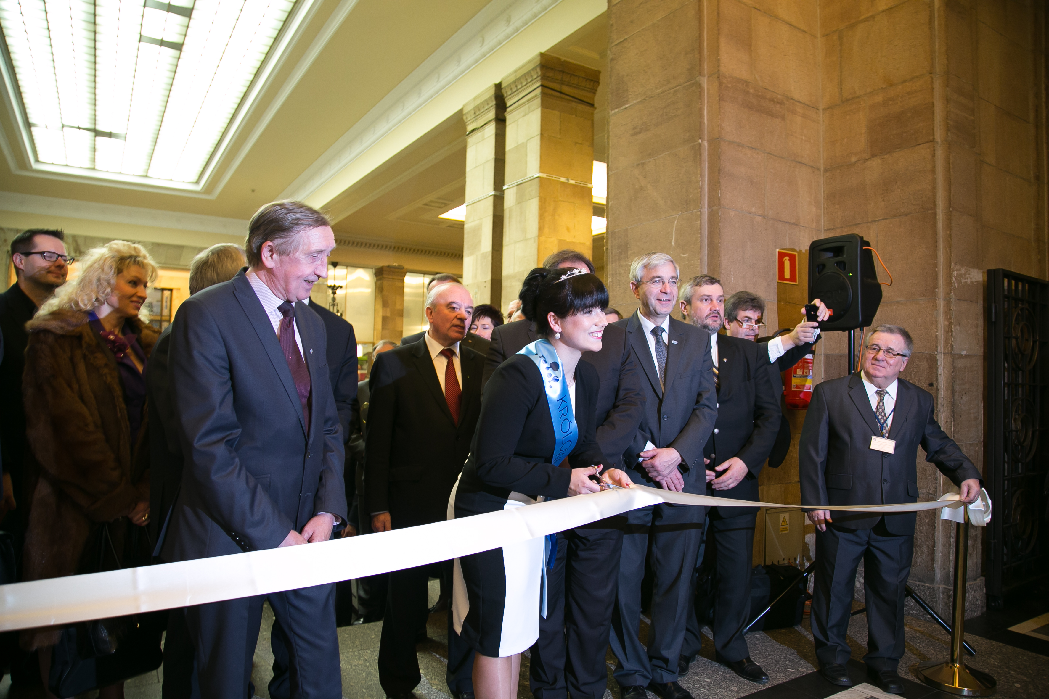 Mleko Expo 2013, Polish Milk Queen, opening ceremony, November 6th, 2013, Katarzyna Gajownik